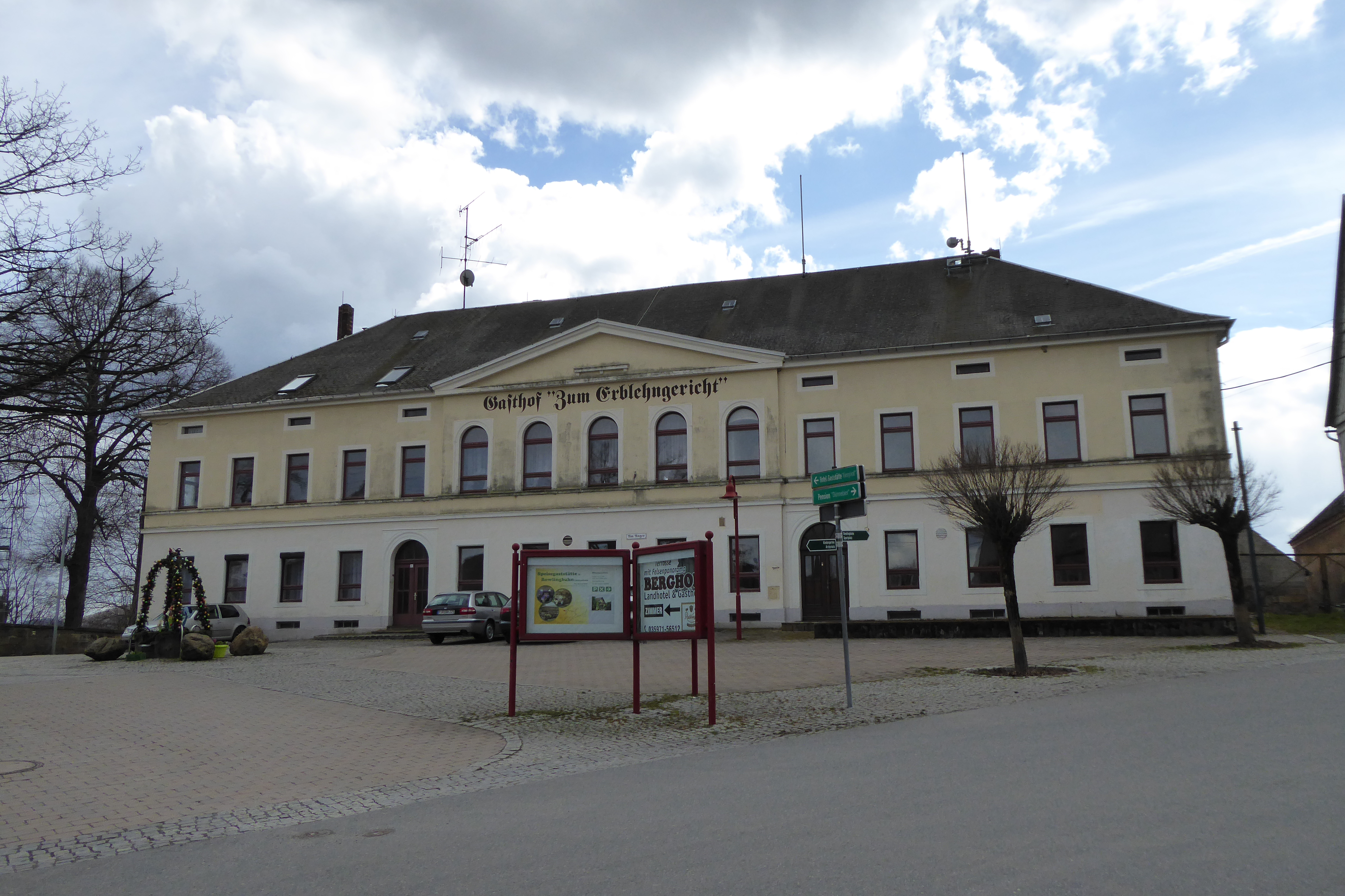 Gasthauf am Anger in Lichtenhain bei Sebnitz